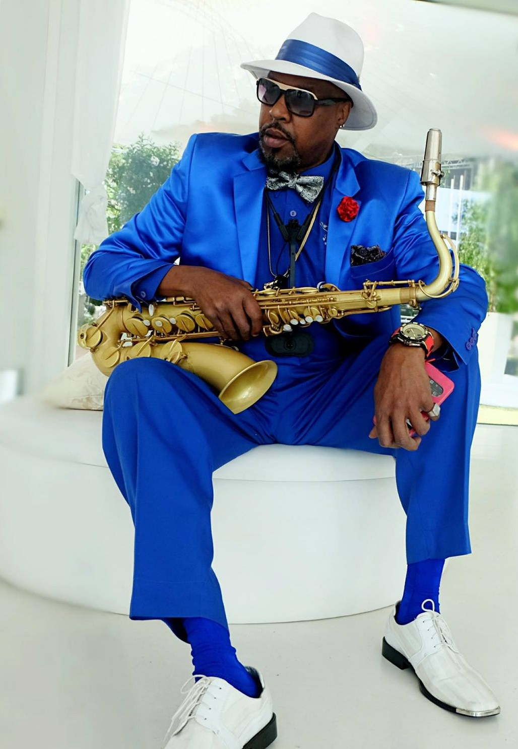 Detroit Gary Wiggins 2015 (Foto: A.Gsottschneider)